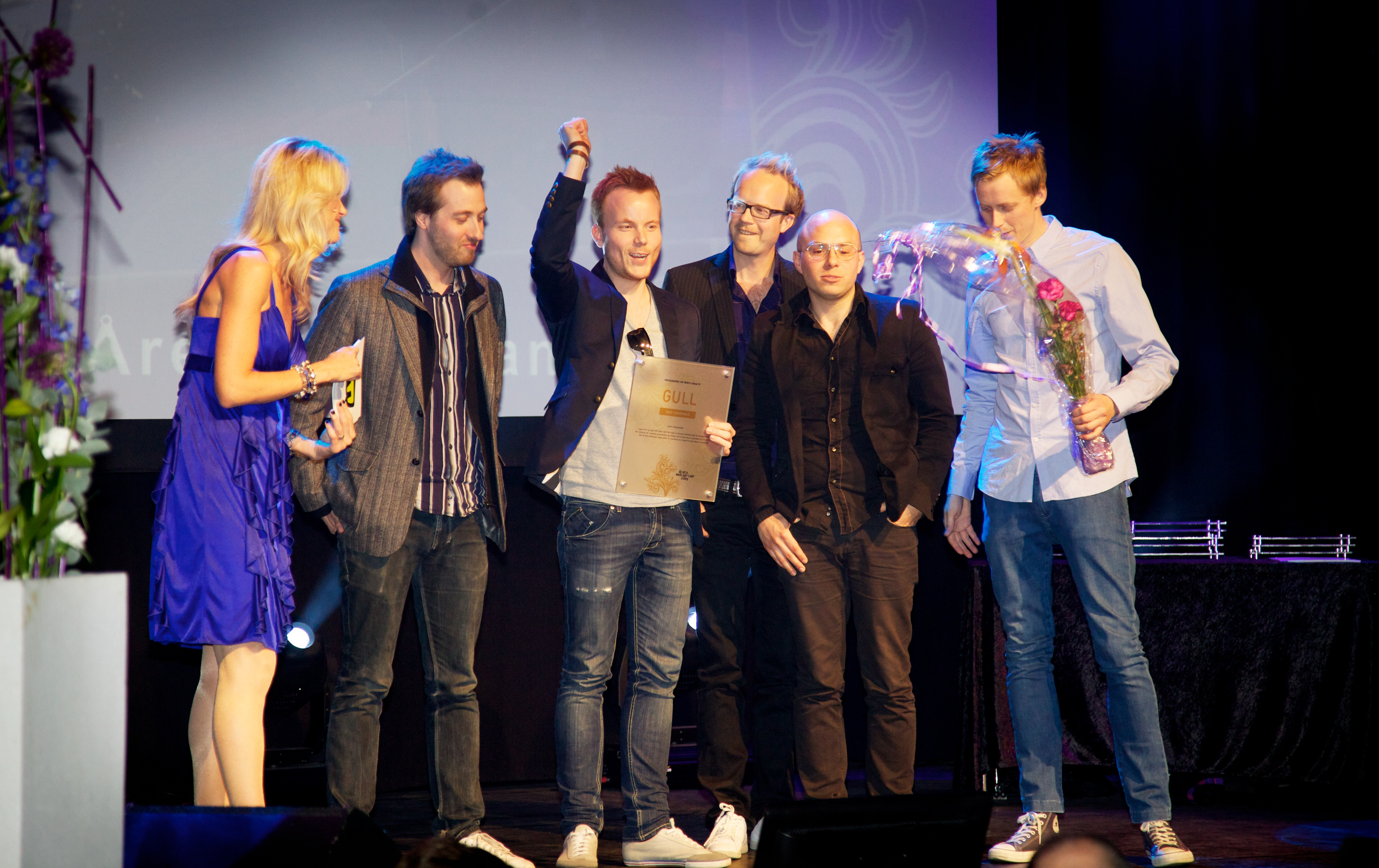 VG Nett fikk prisen for Årets programserie for web/lokal-TV med anthomas.